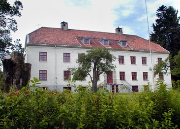 Hovedbygningen ved Bjerketun ungdomspsykiatriske behandlingshjem på Tanum i Bærum.